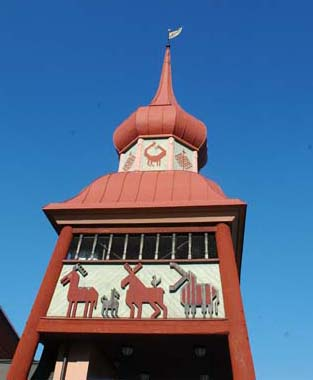 klockstapel outside Jamtli museum in Östersund, Sweden